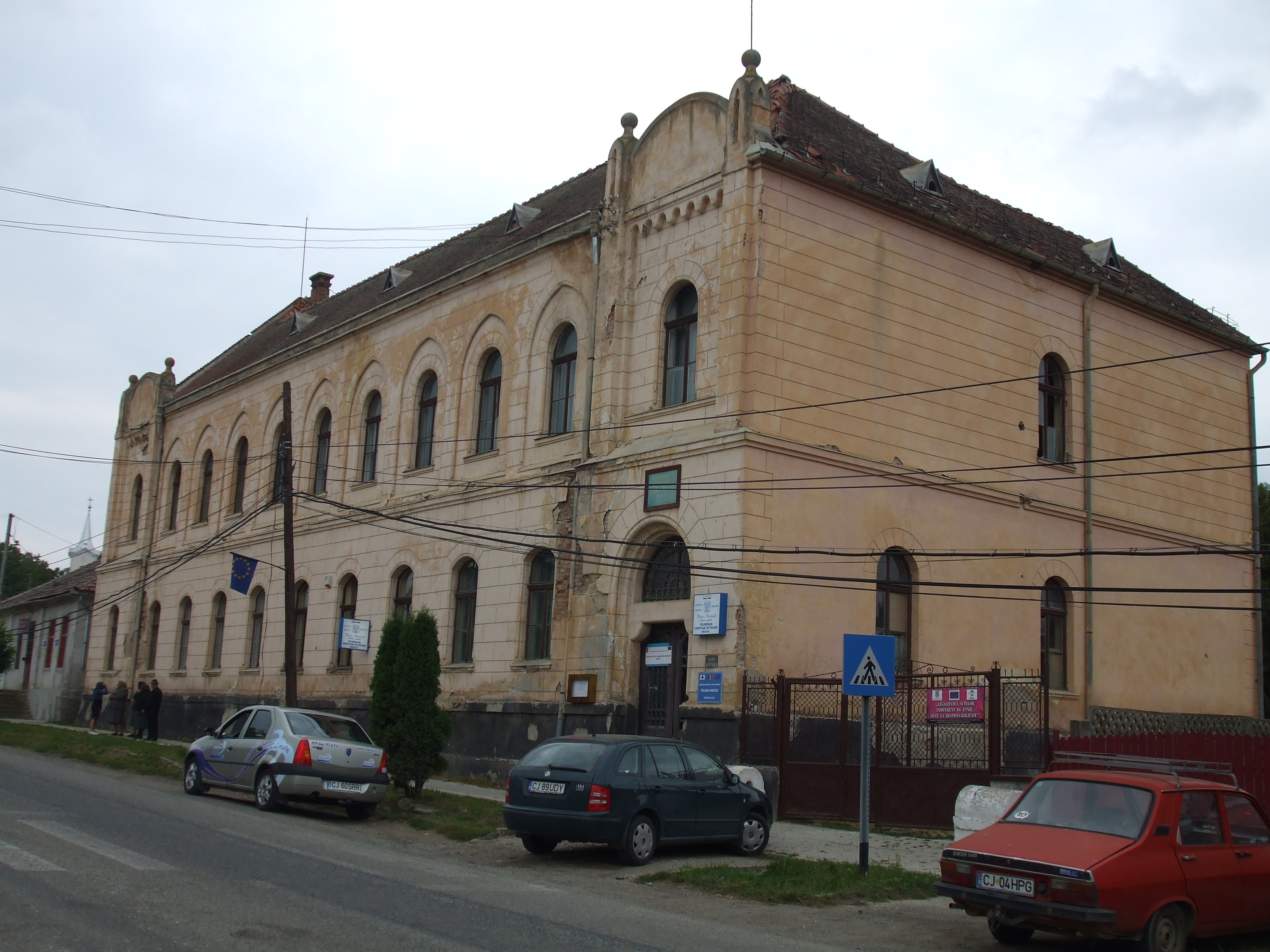 Mociu - clădirea administrativă interbelică